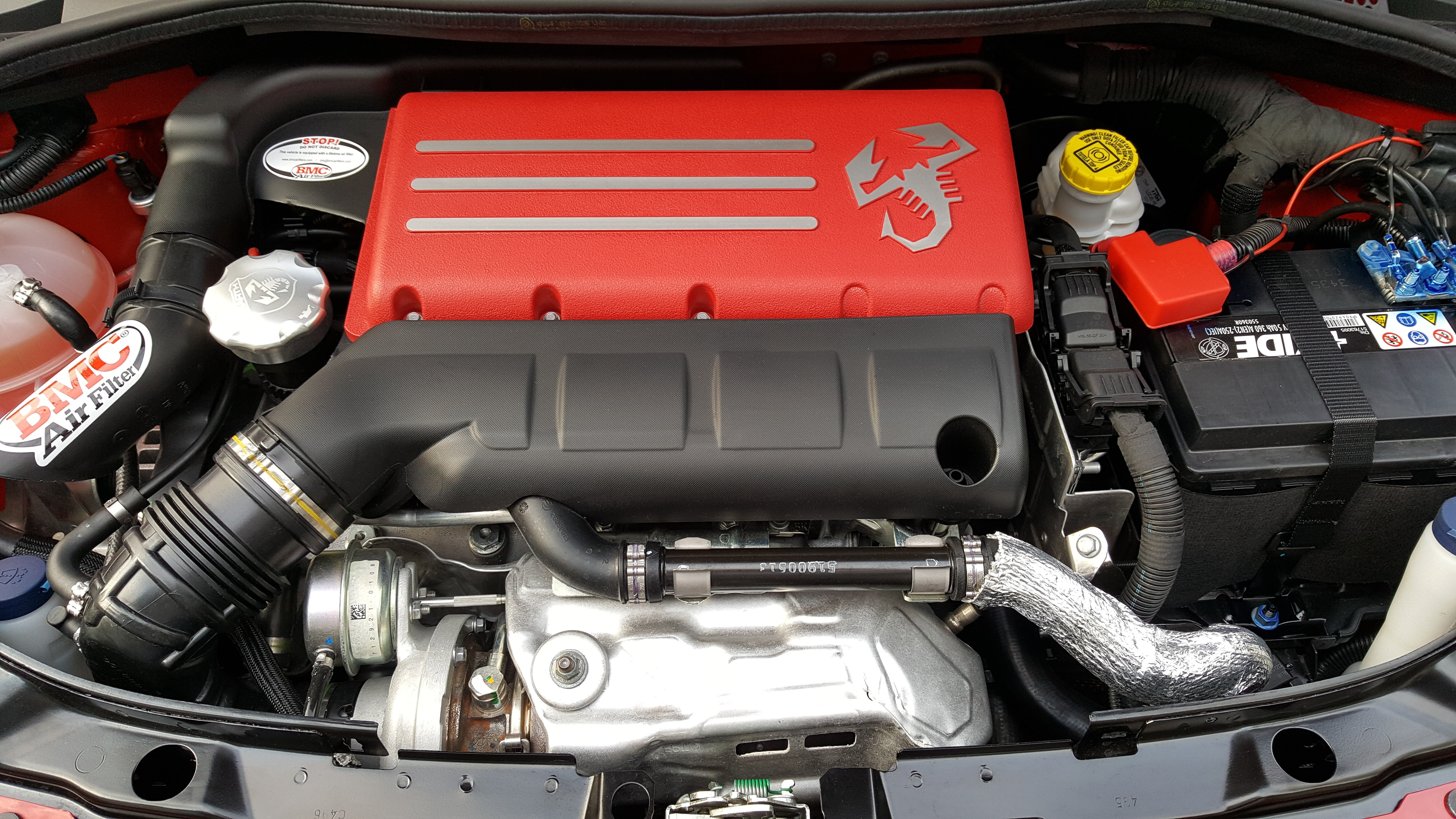 Competizione